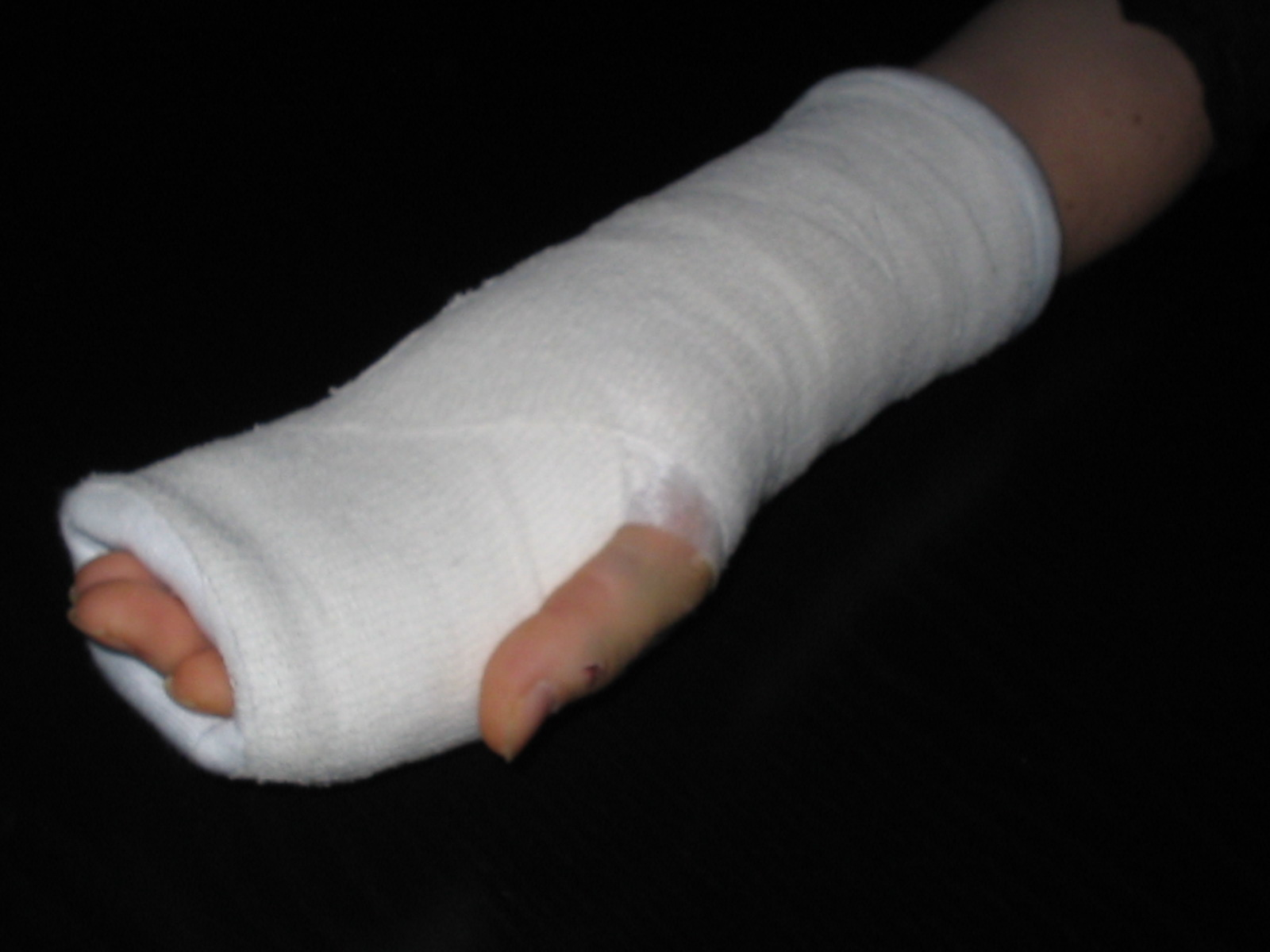 my girlfriends hand )